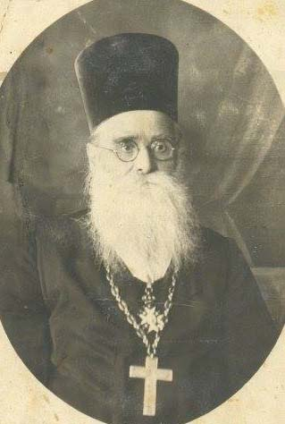 Прота Ђорђе Камперлић, оснивач четничког бора у Лесковцу